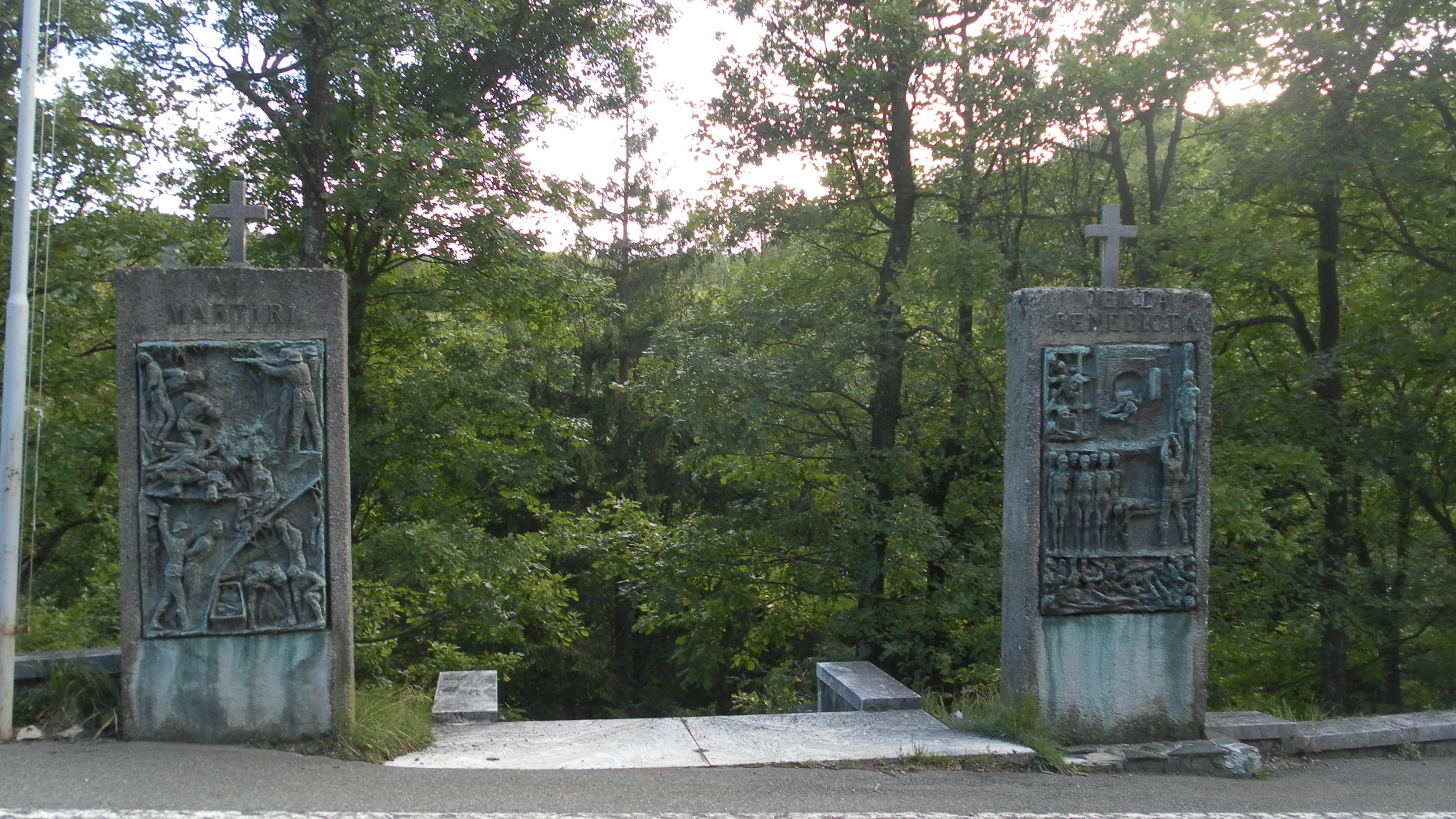 Sacrario presso l'Abbazia della Benedicta, Bosio (AL)